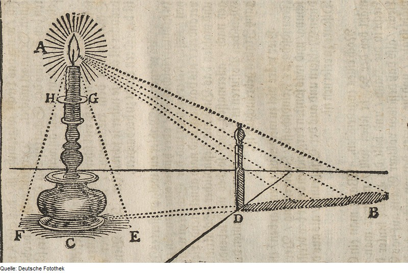 Original image description from the Deutsche Fotothek Holzschnitt & Optik